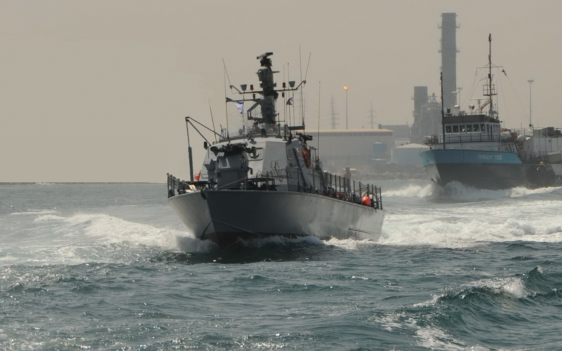 כלי שייט בט"ש